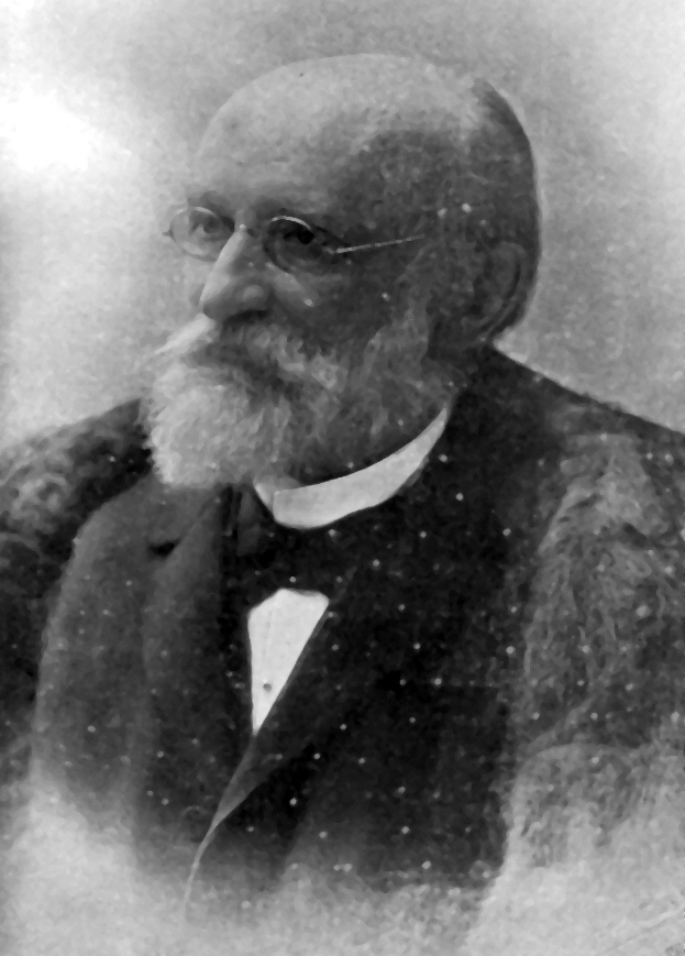 Josef rytíř Webr z Pravomilu